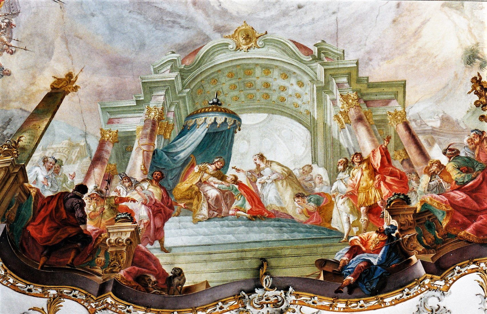 St. Magnus (Unterrammingen), Szenen aus dem Leben des heiligen Magnus, Langhausfresko (1769): Abschied des heiligen Magnus von seinen Eltern